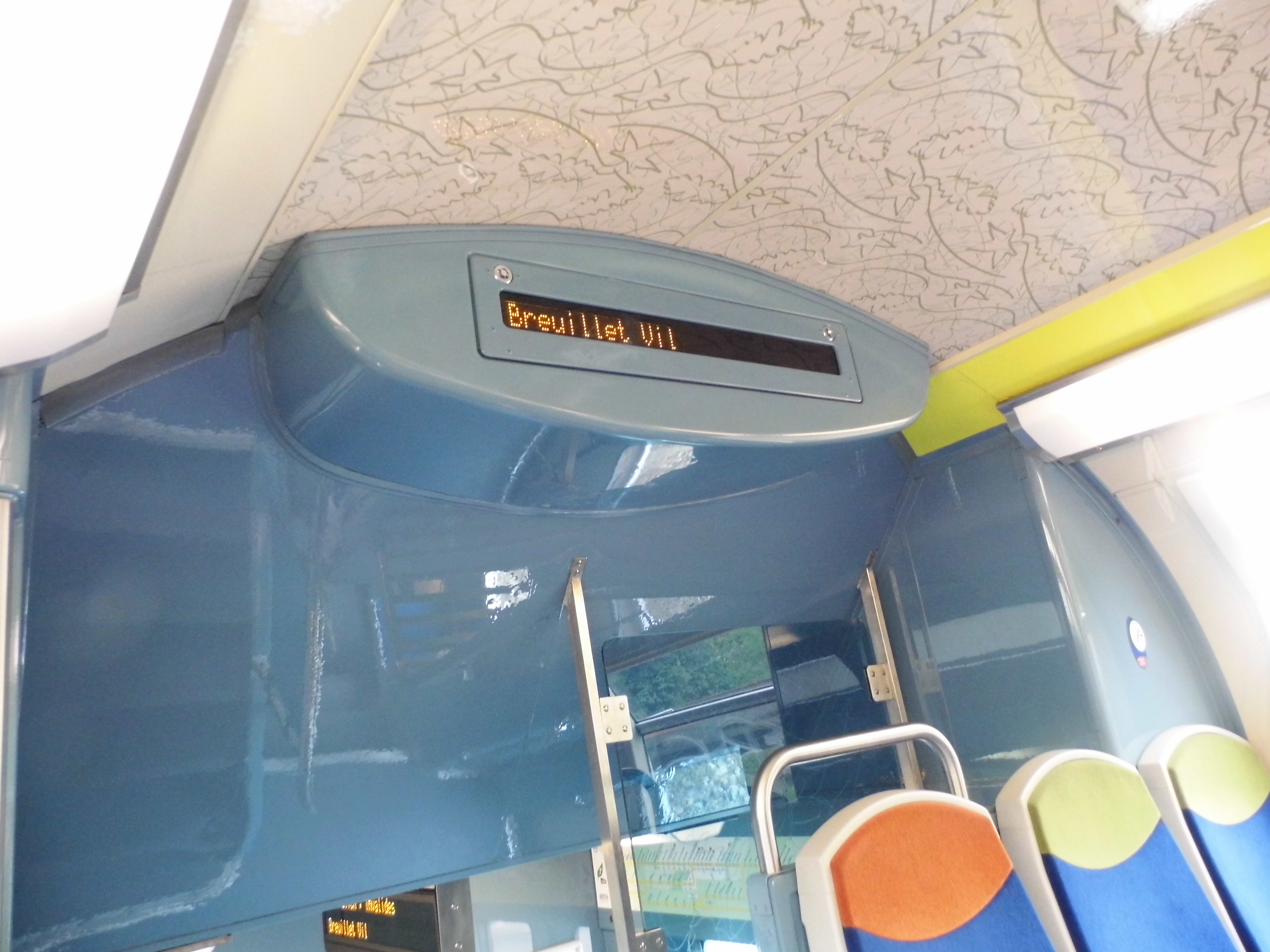 Sive en salle haute d'une rame Z 20500 et d'une Z 5600.